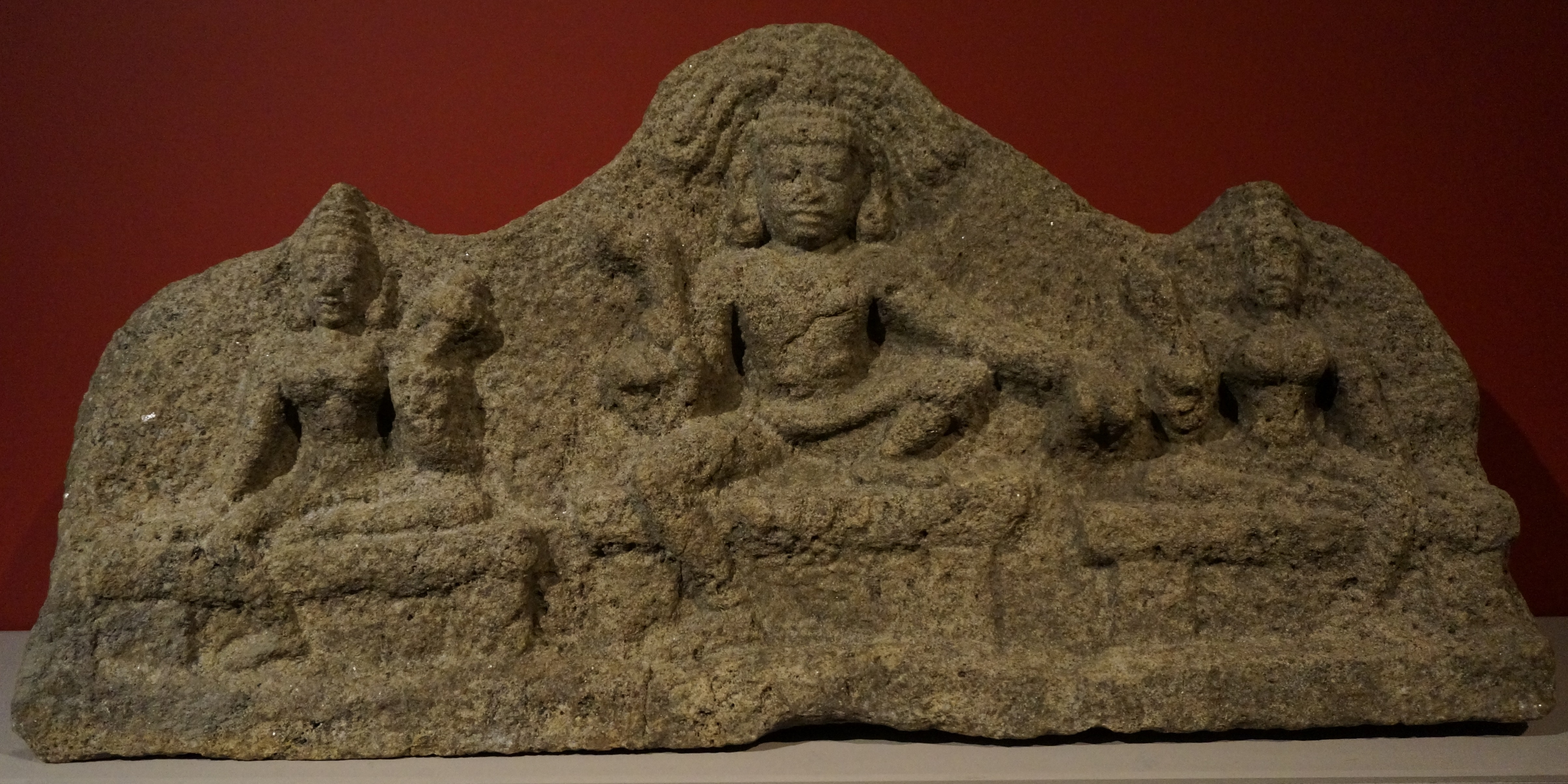 Aiyanar et ces deux épouses, don 1872 Lamairesse, 15 ou 17e siècle .